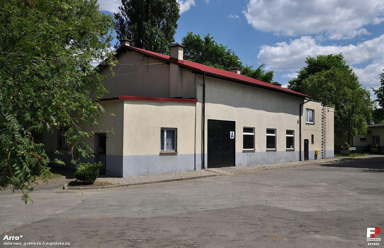 Jeden z ocalałych budynków dawnego szybu Mariusz kopalni Flora. Pierwotnie mieścił maszynę wyciągową szybu, obecnie stanowi siedzibę firmy Stern Polska Sp. z o.o.